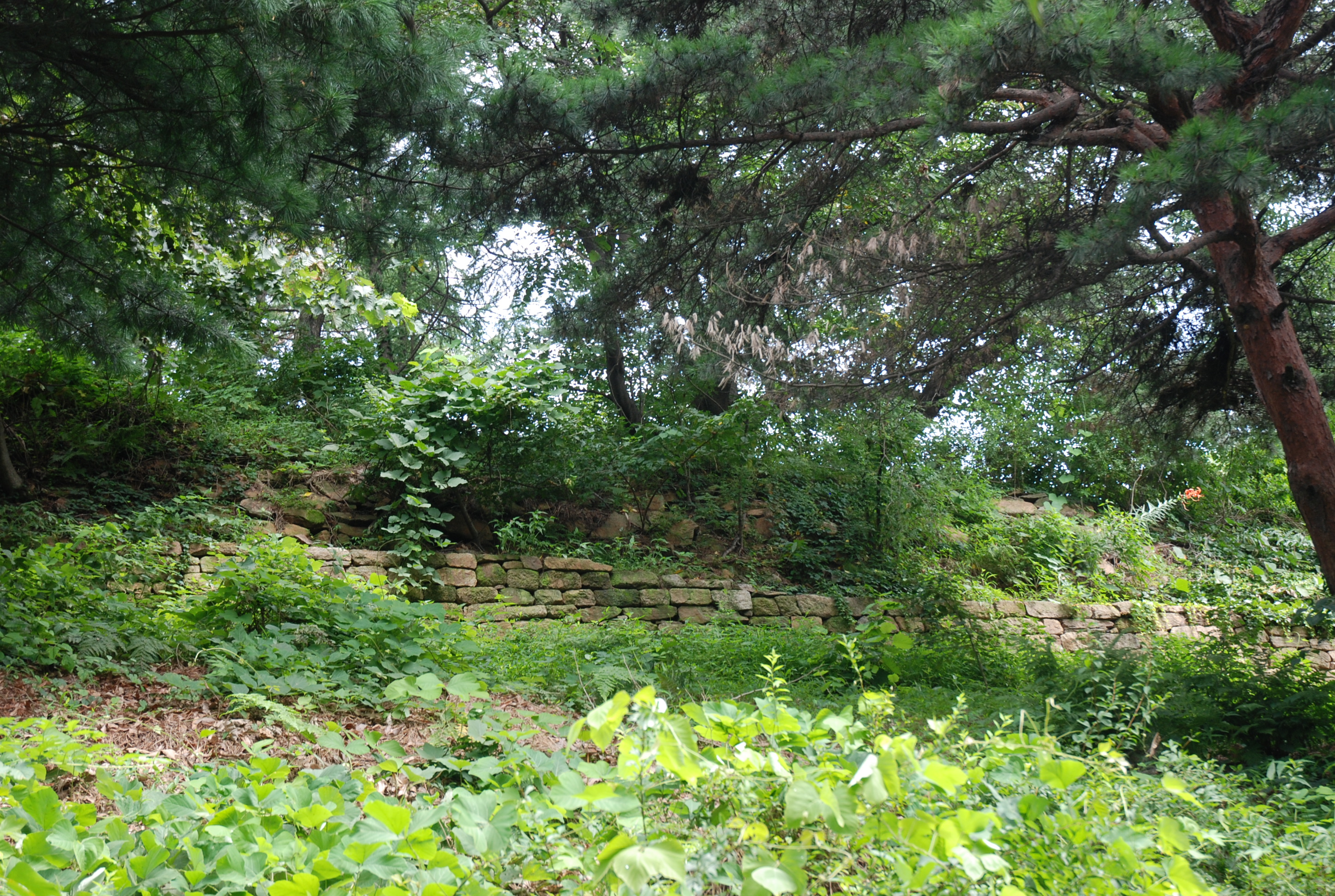 아차산성 터